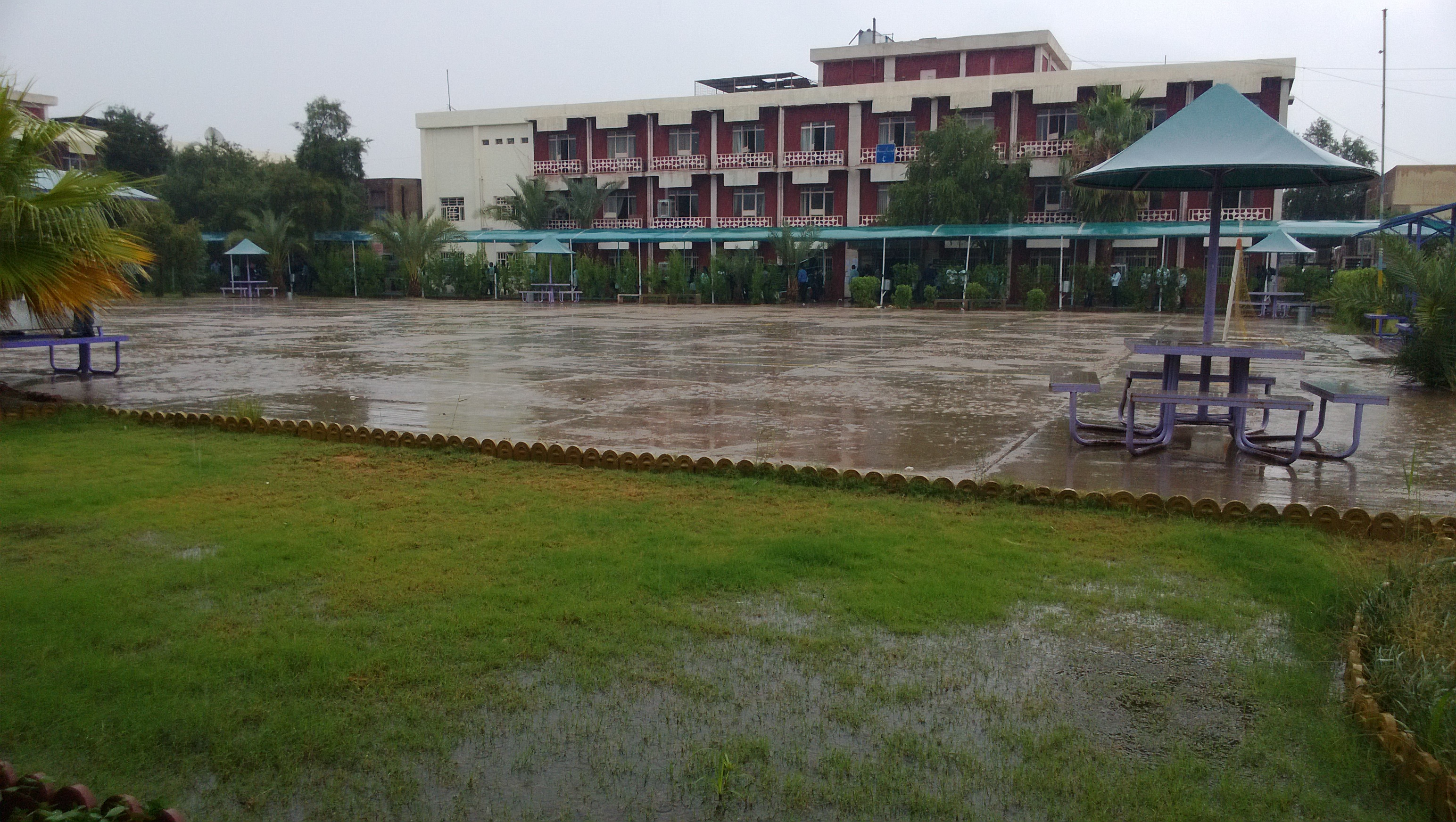 كلية الادارة والاقتصاد - الجامعة المستنصرية في بغداد